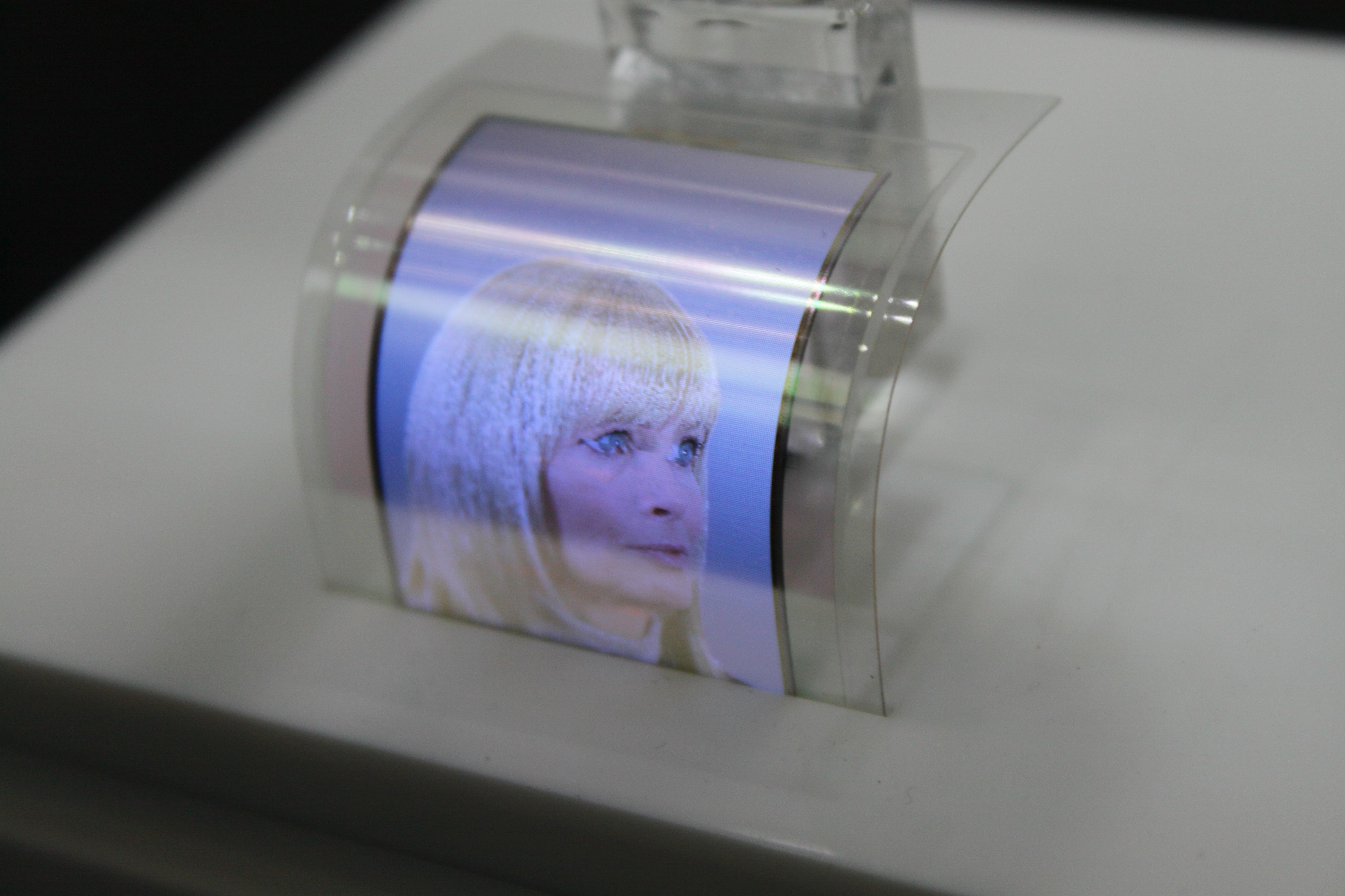 CeBIT 2011; 3D Passport system der Bundesdruckerei auf der CeBIT; rotierendes 3D-Passbild auf OLED-Display